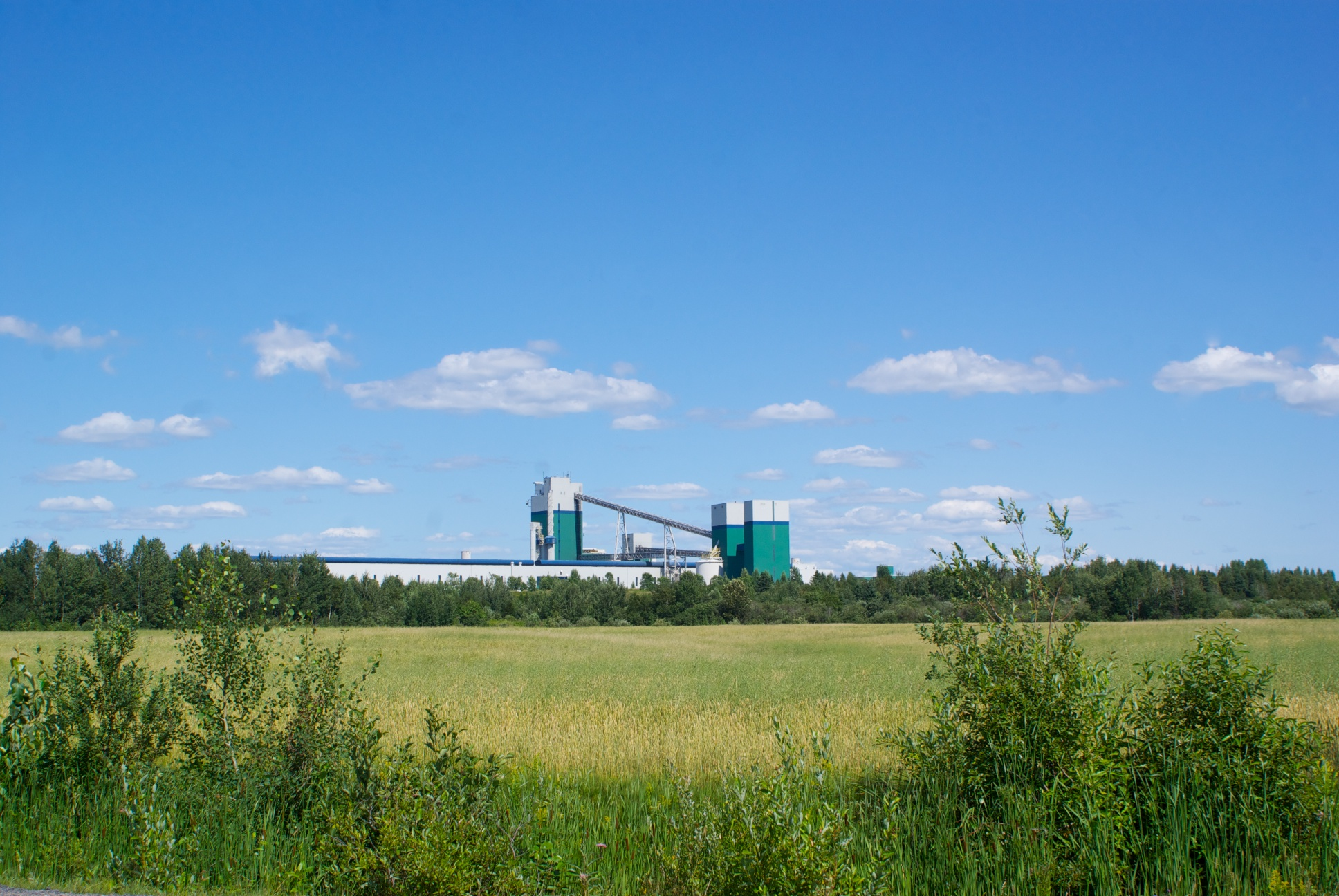 Usine Rio Tinto Alcan à Alma, Québec